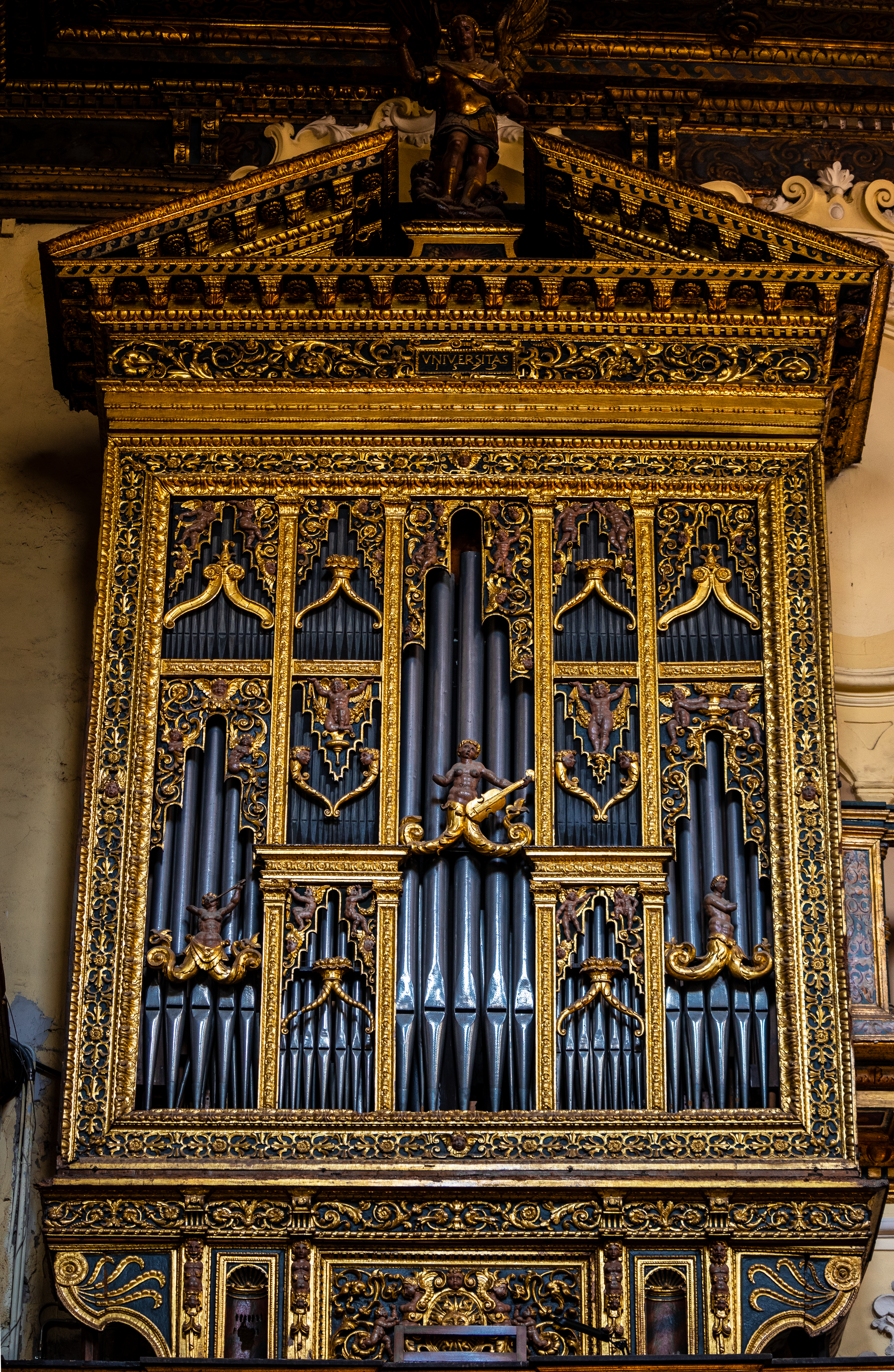 L'organo